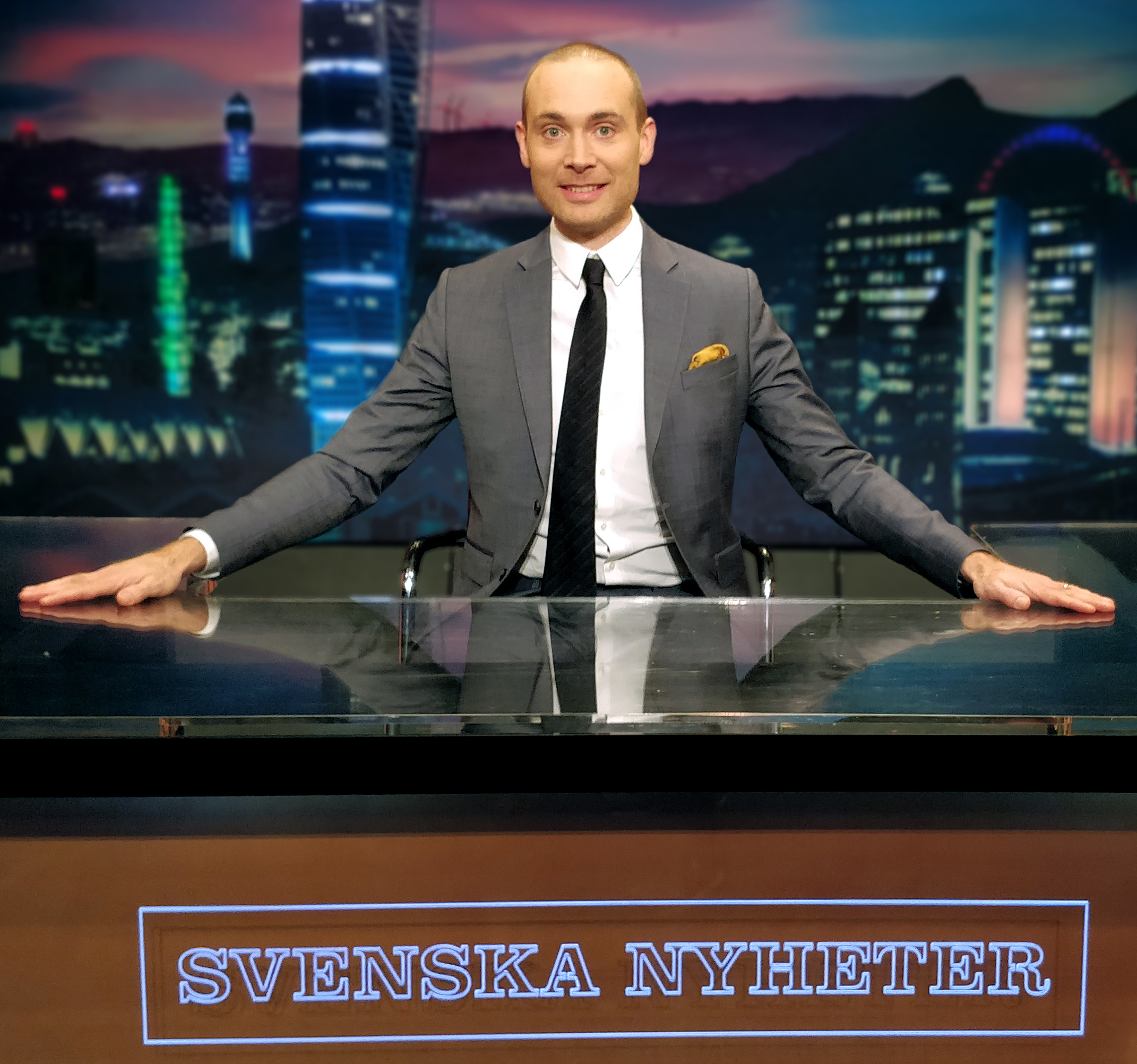 Jesper Rönndahl i Svenska nyheterstudion efter inspelningen av avsnitt 9, säsong 3, 22 mars 2019.